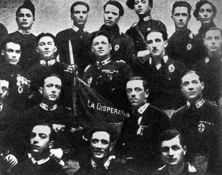 La squadra d'azione La Disperata di Firenze prima del 1945.